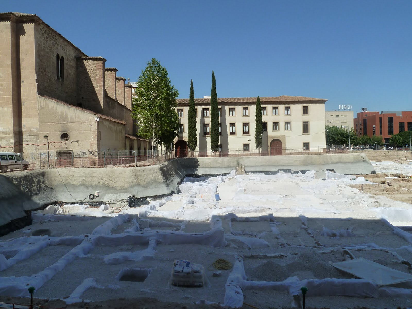 Yacimiento San Esteban